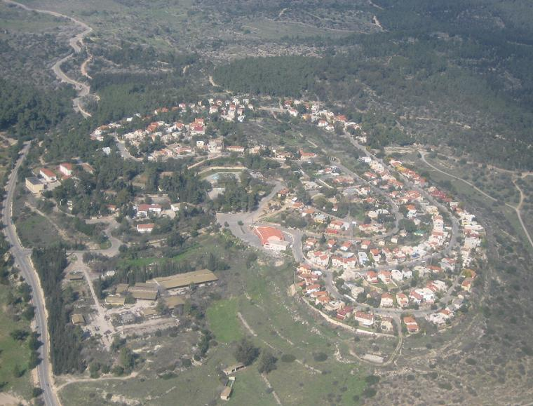 מושב שריגים. צילום אוויר לכיוון צפון מערב רישיון נוצר על ידי משתמש:אסף.צ